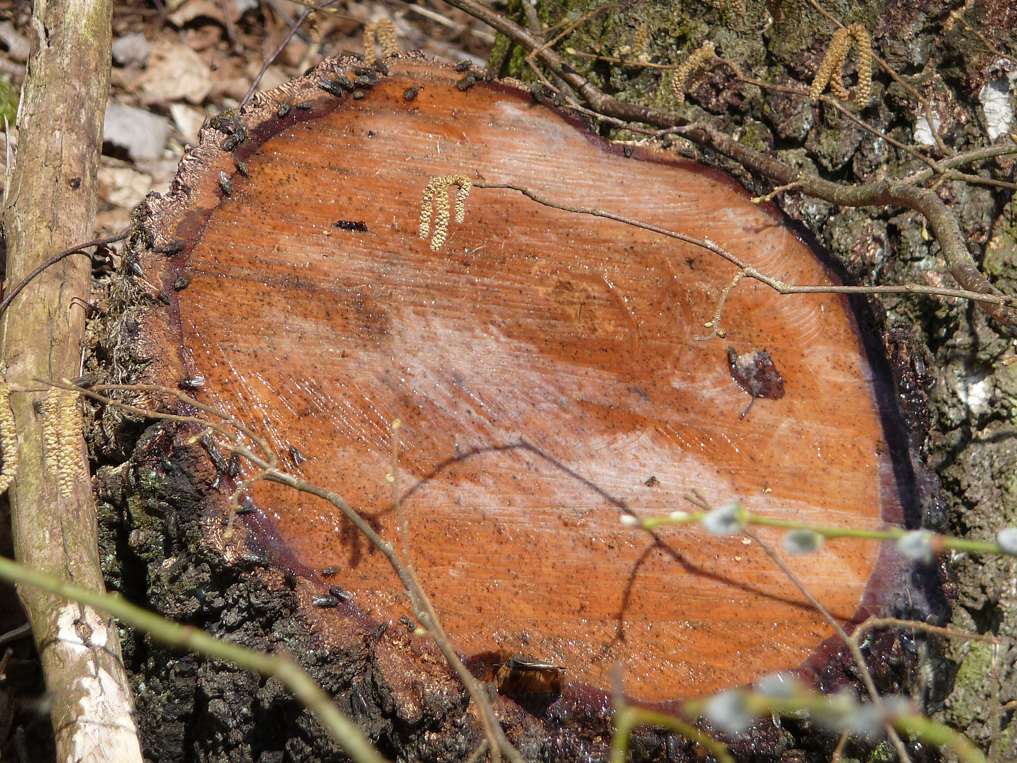 Austritt von Birkensaft bei Zwiesel, Bayerischer Wald an einem Birkenstumpf im Frühling mit zahlreichen Fliegen und Kleinem Fuchs (Aglais urticae)